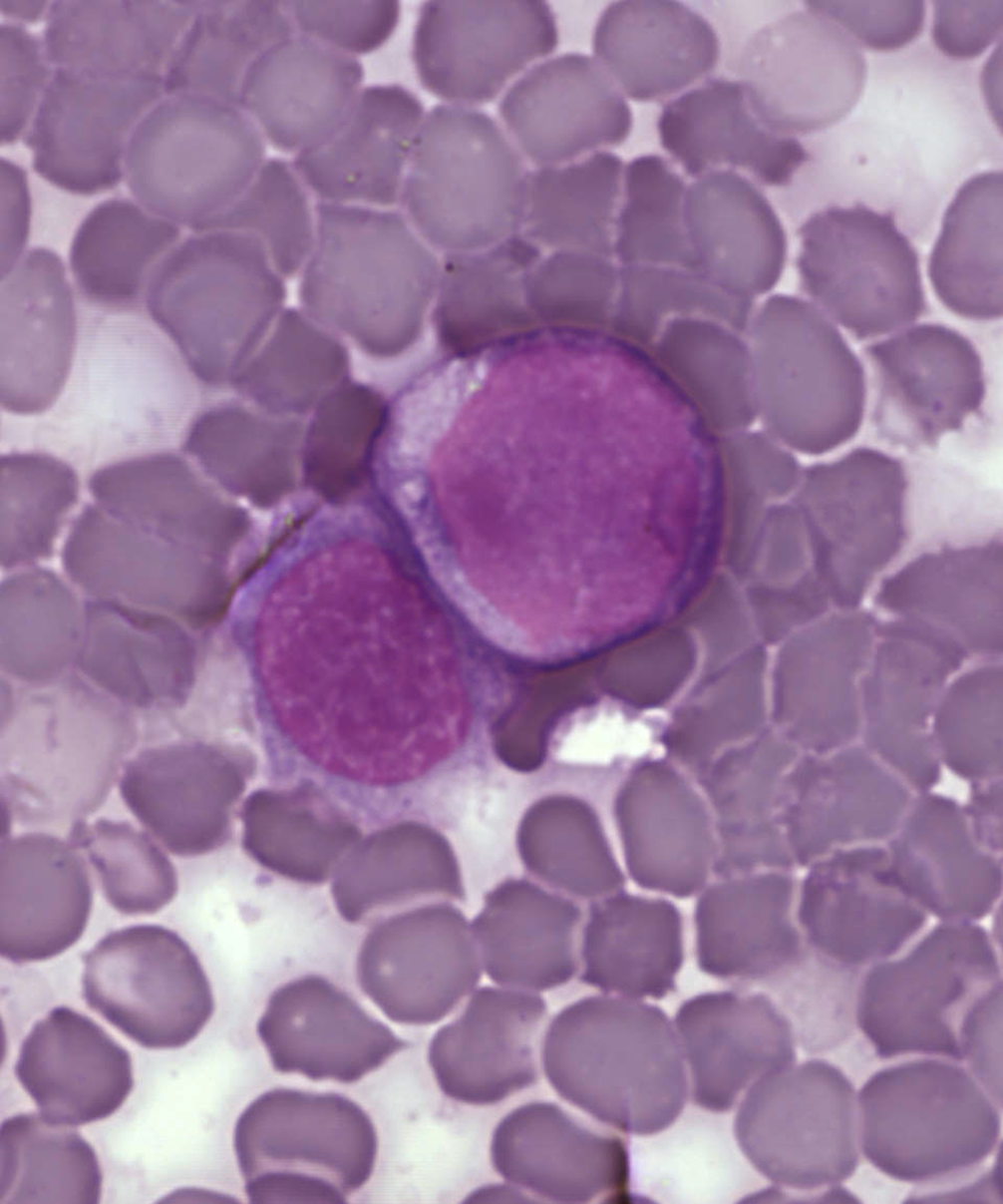 Leukemia cells.